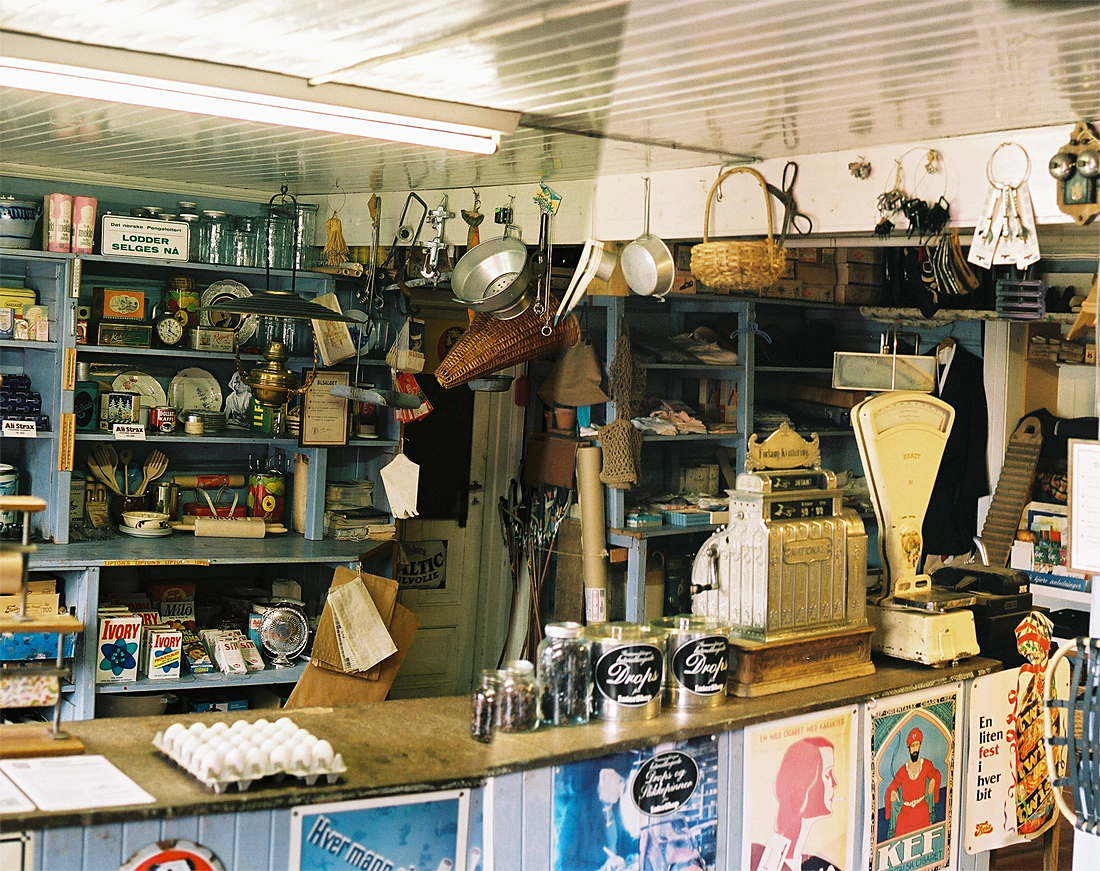 Mogen Handel, Veggli, Rollag, Buskerud. Landhandel 1840-1975.